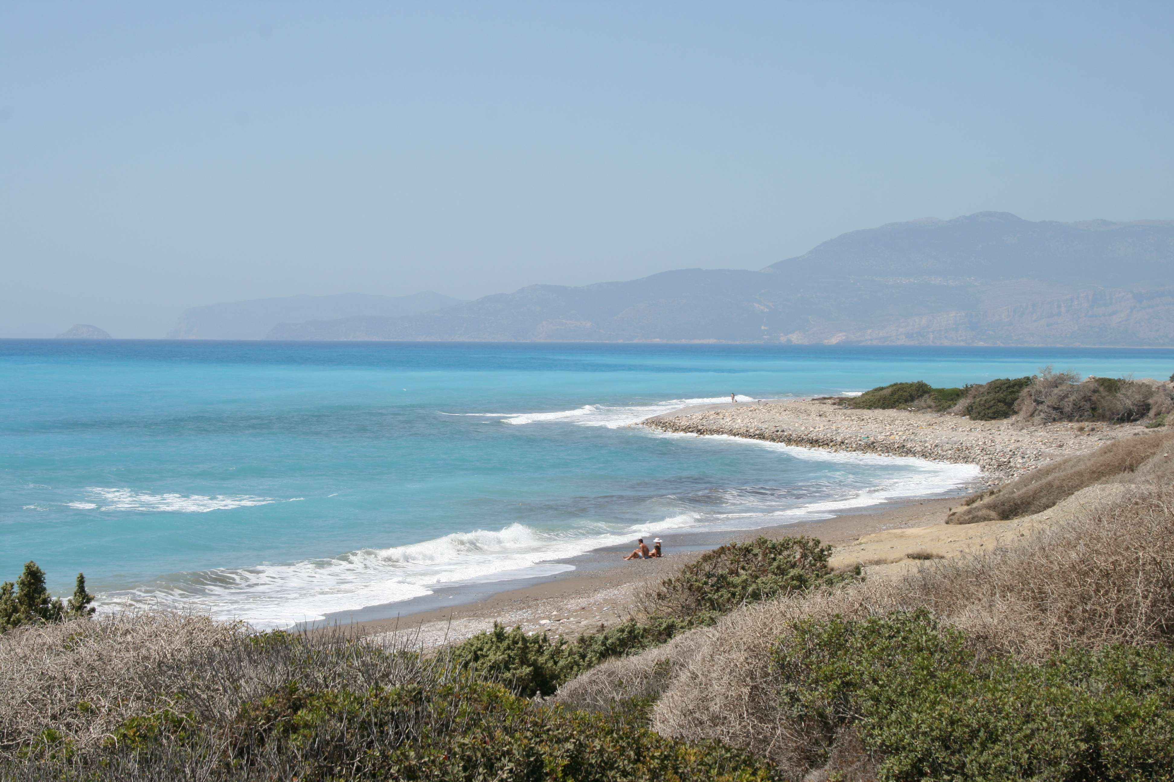 Spiaggia nel golfo di Apolakkia